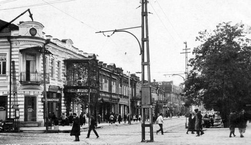 Пролетарский проспект (в настоящее время проспект Мира) 1920-е годы